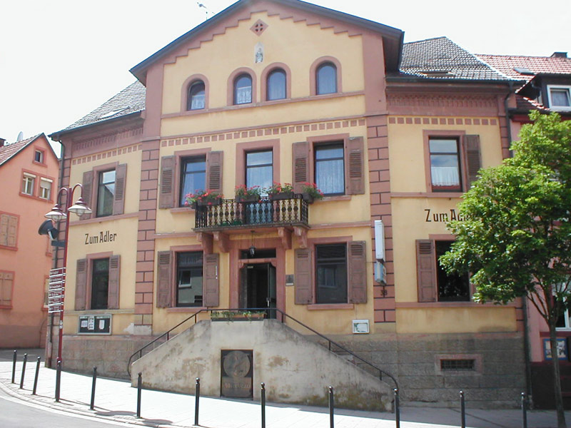 Historisches Gasthaus und Brauerei Adler in Waibstadt